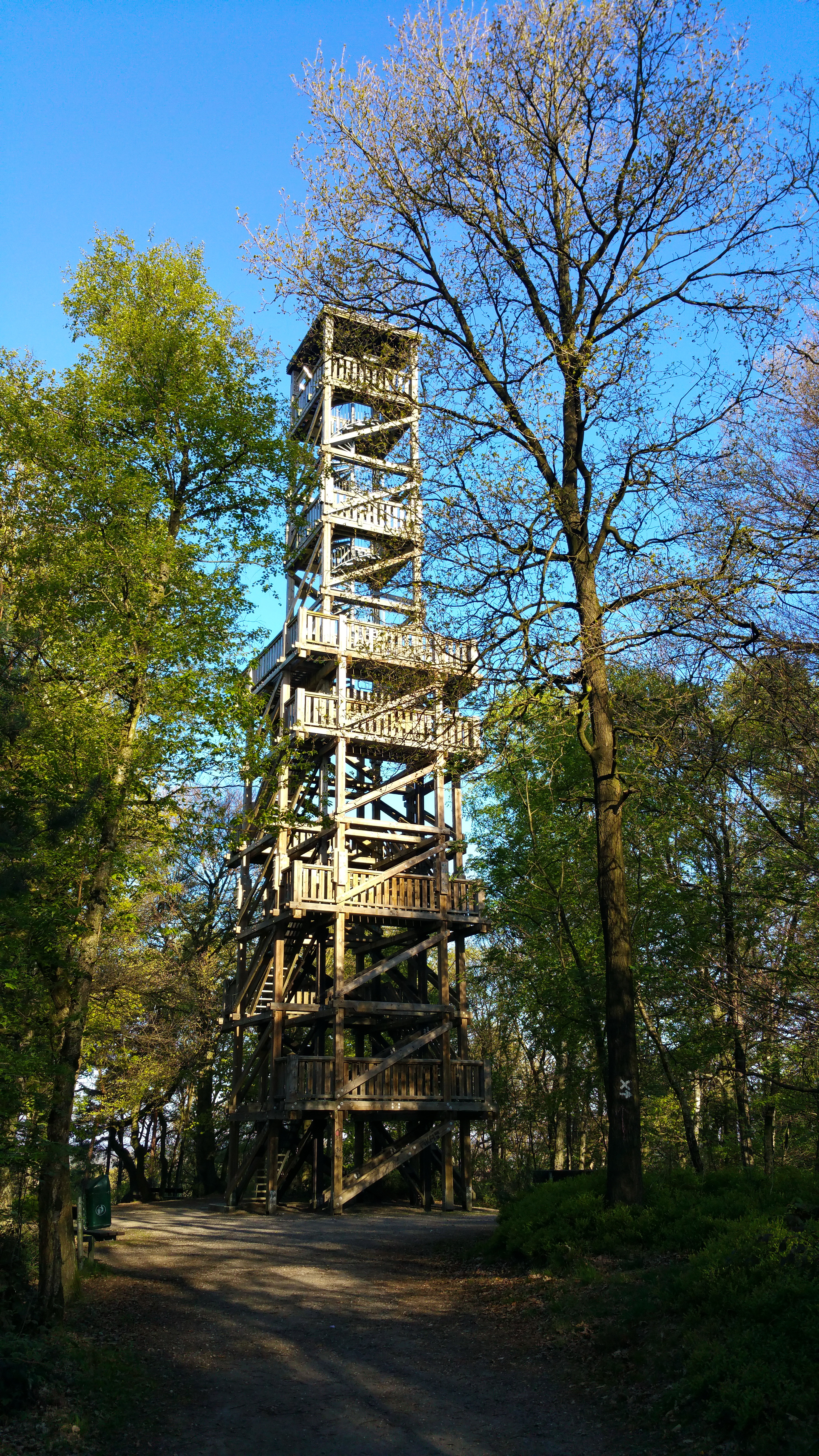 Aussichtsturm auf dem Taubenberg (Nettetal), Foto vom 29.04.2017